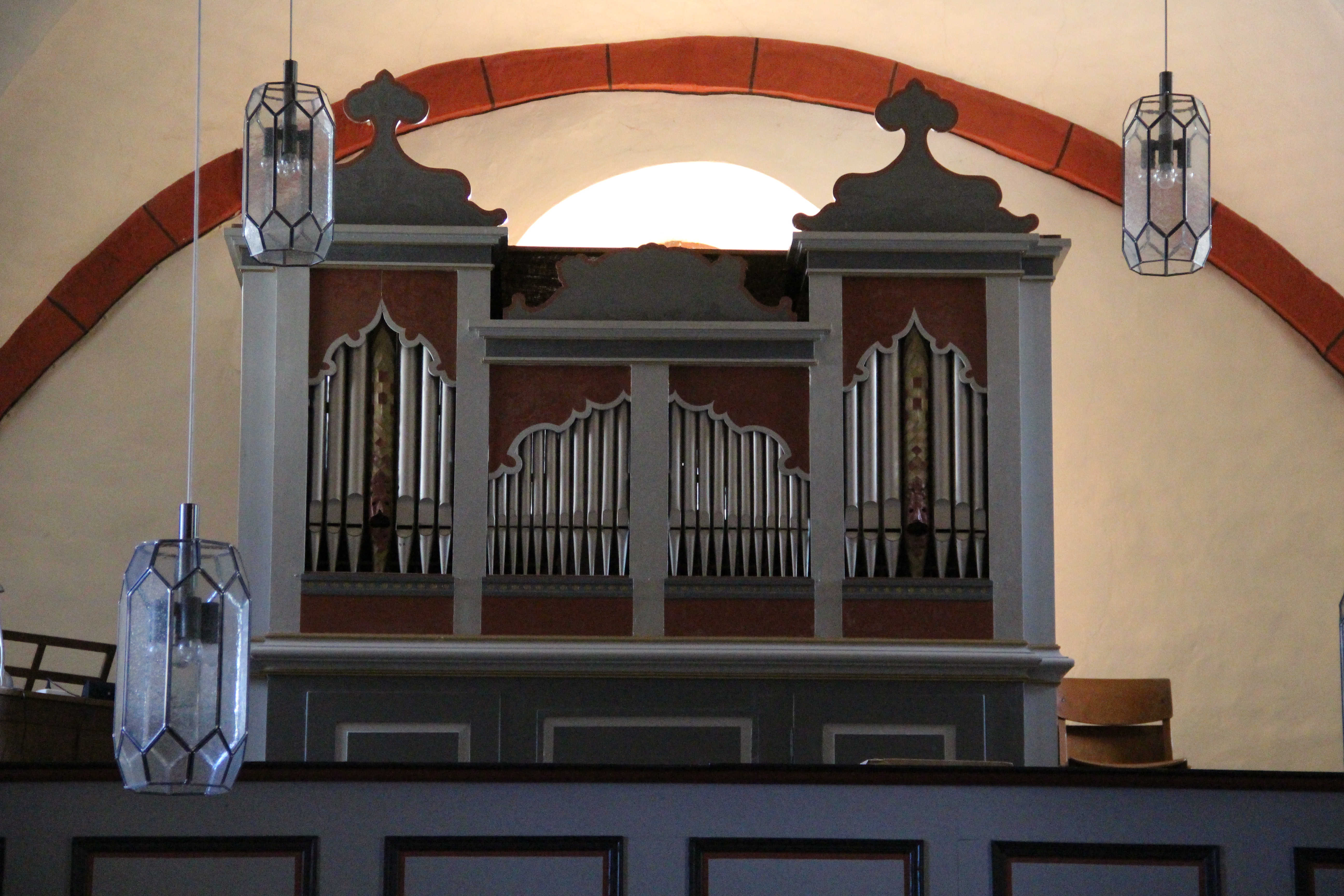 Orgel der Martinskirche in Michelbach (Marburg)